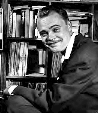 Leif "Smoke Rings" Anderson 1960-tal